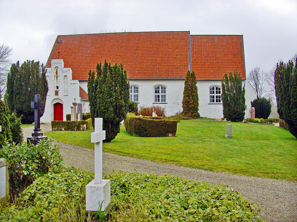 fra syd